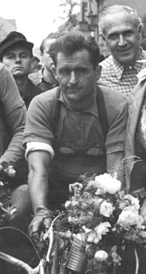 == DDR-Radsportler Paul Dinter, 1953